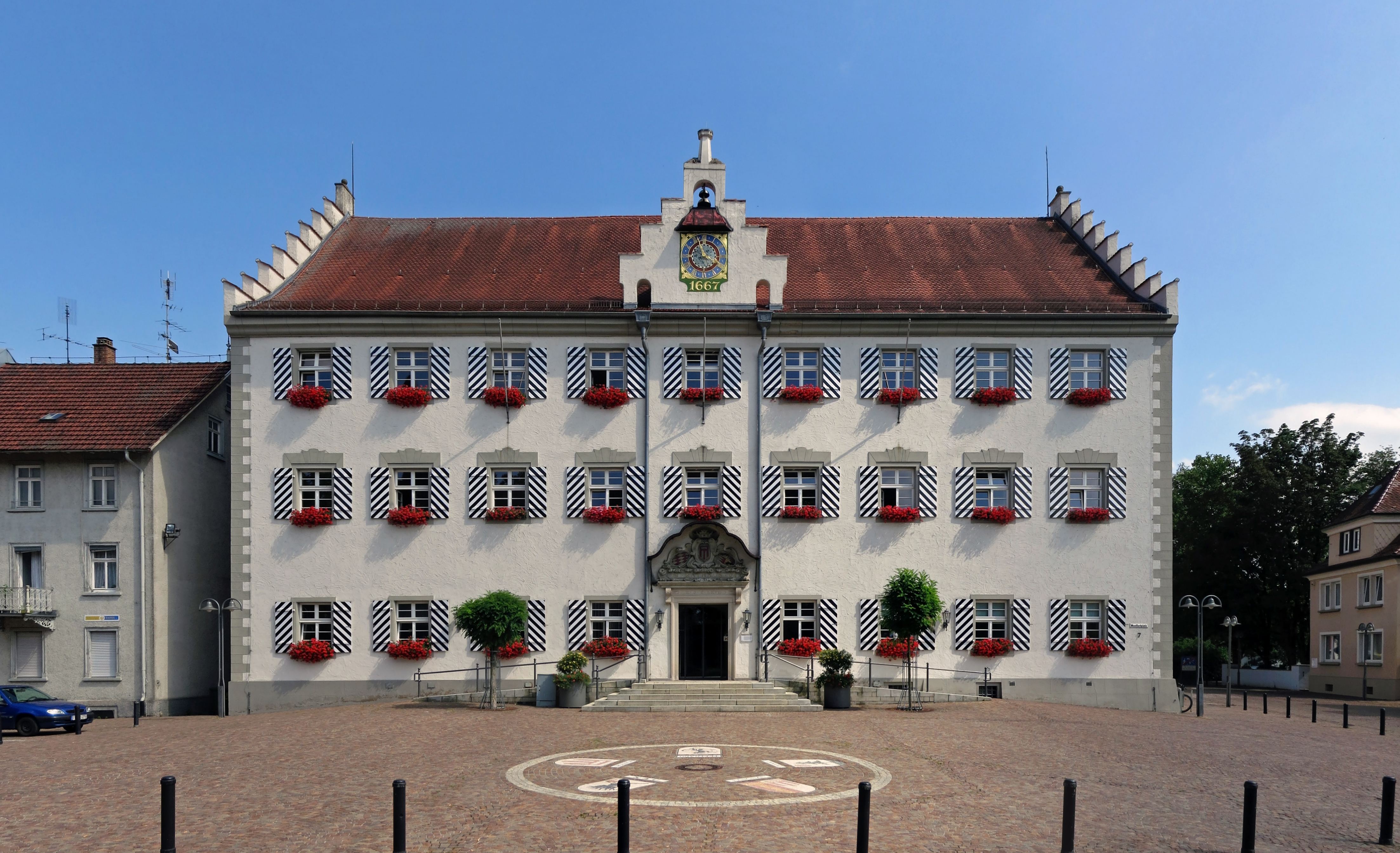 Das Alte Schloss in Tettnang wurde ab 1667 als Residenz für den Grafen von Montfort erbaut und 1904 von der Stadt erworben, wo es schließlich zum Rathaus umgebaut wurde.